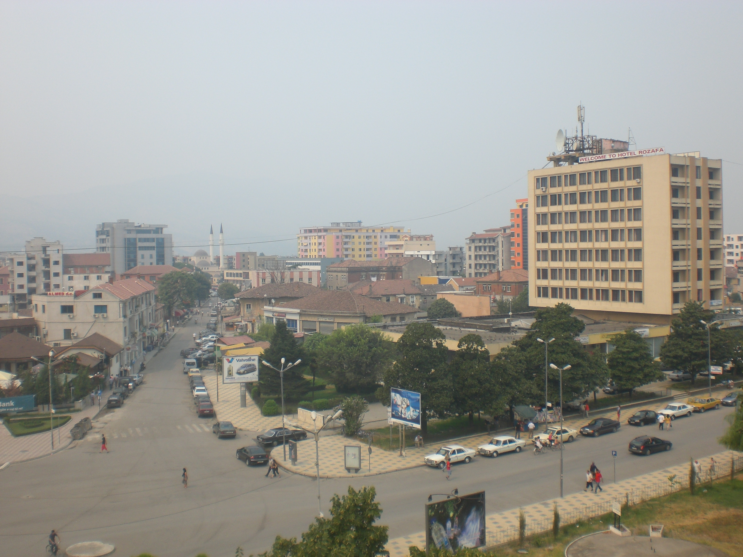 Shkoder